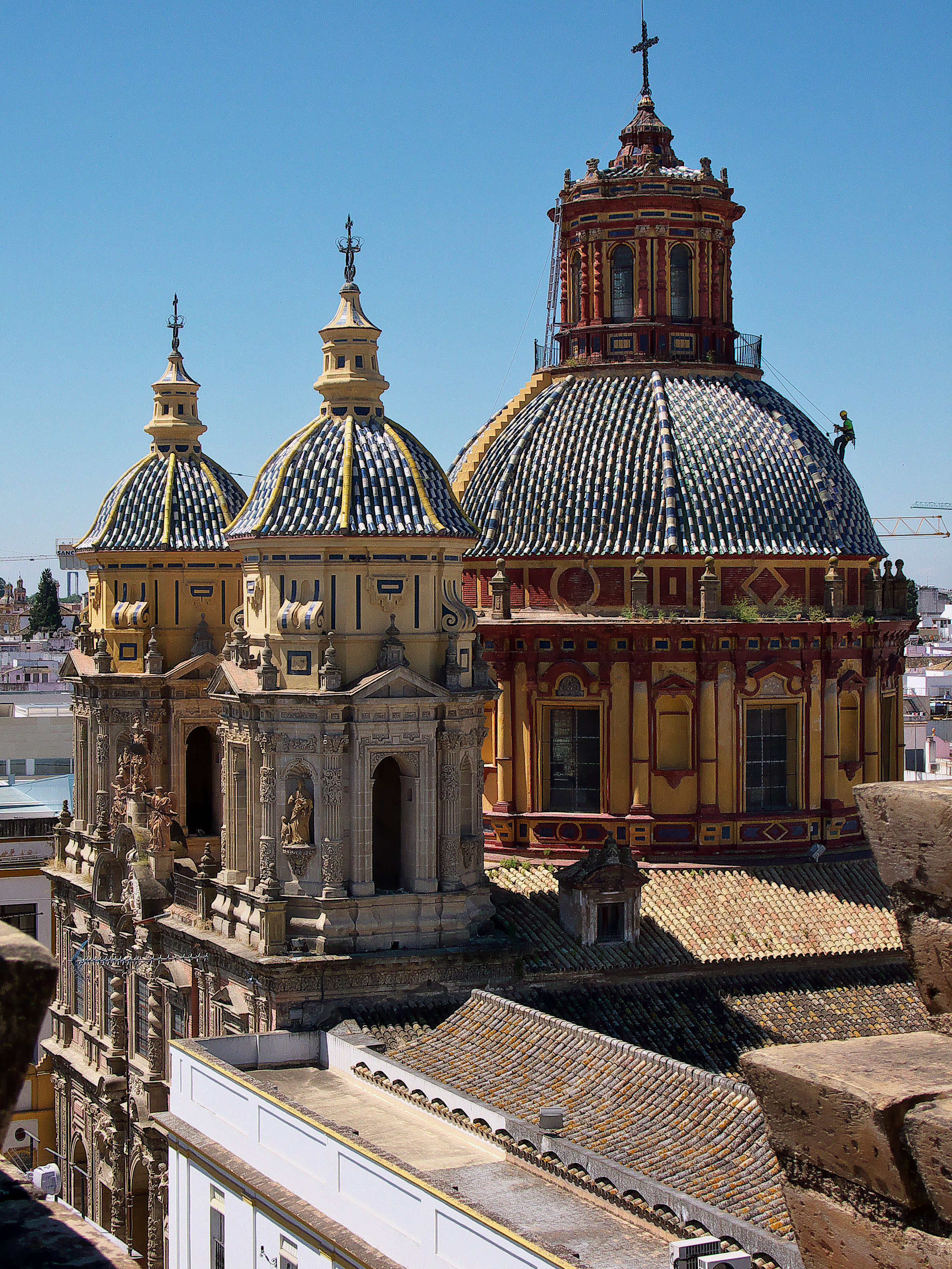 Iglesia de San Luis de los Franceses, Sevilla. La gran obra del barroco europeo, siendo inagurada por el arzobispo Luis de Salcedo y Azcona (1731)